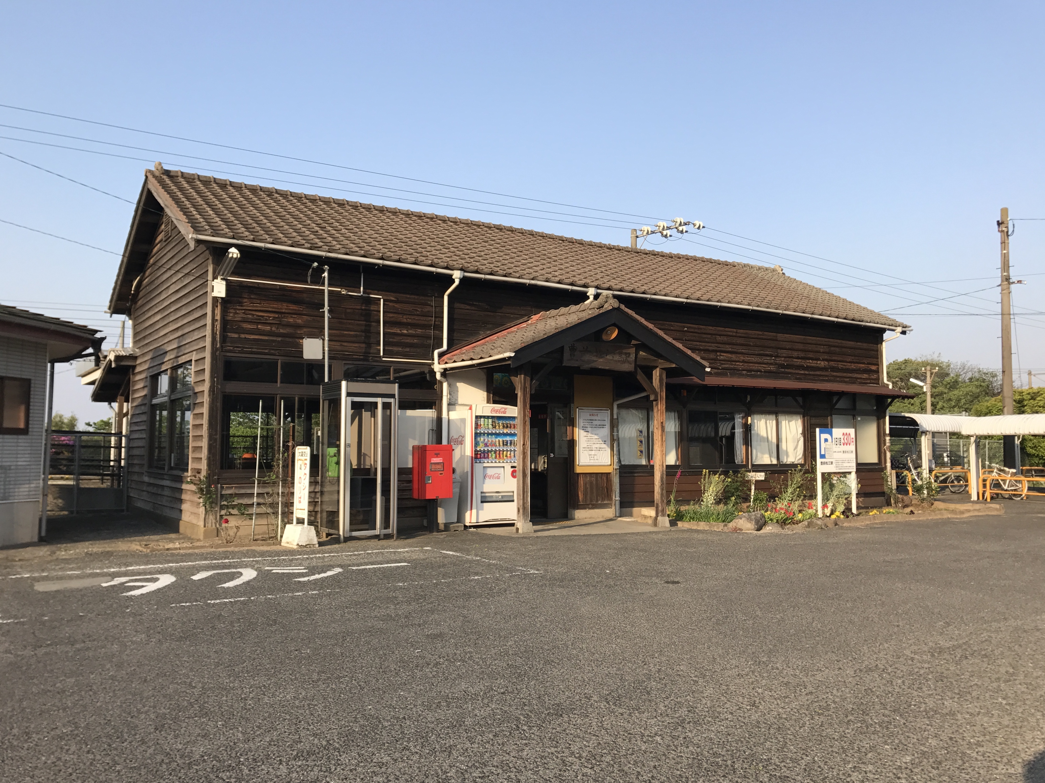 豊前松江駅駅舎